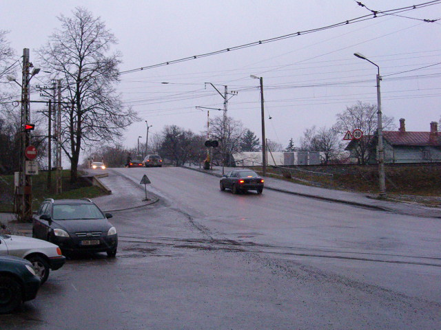 Tondi raudteeülesõit. Vaade Pärnu maantee poolt. Tallinn.